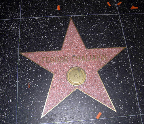 звезда